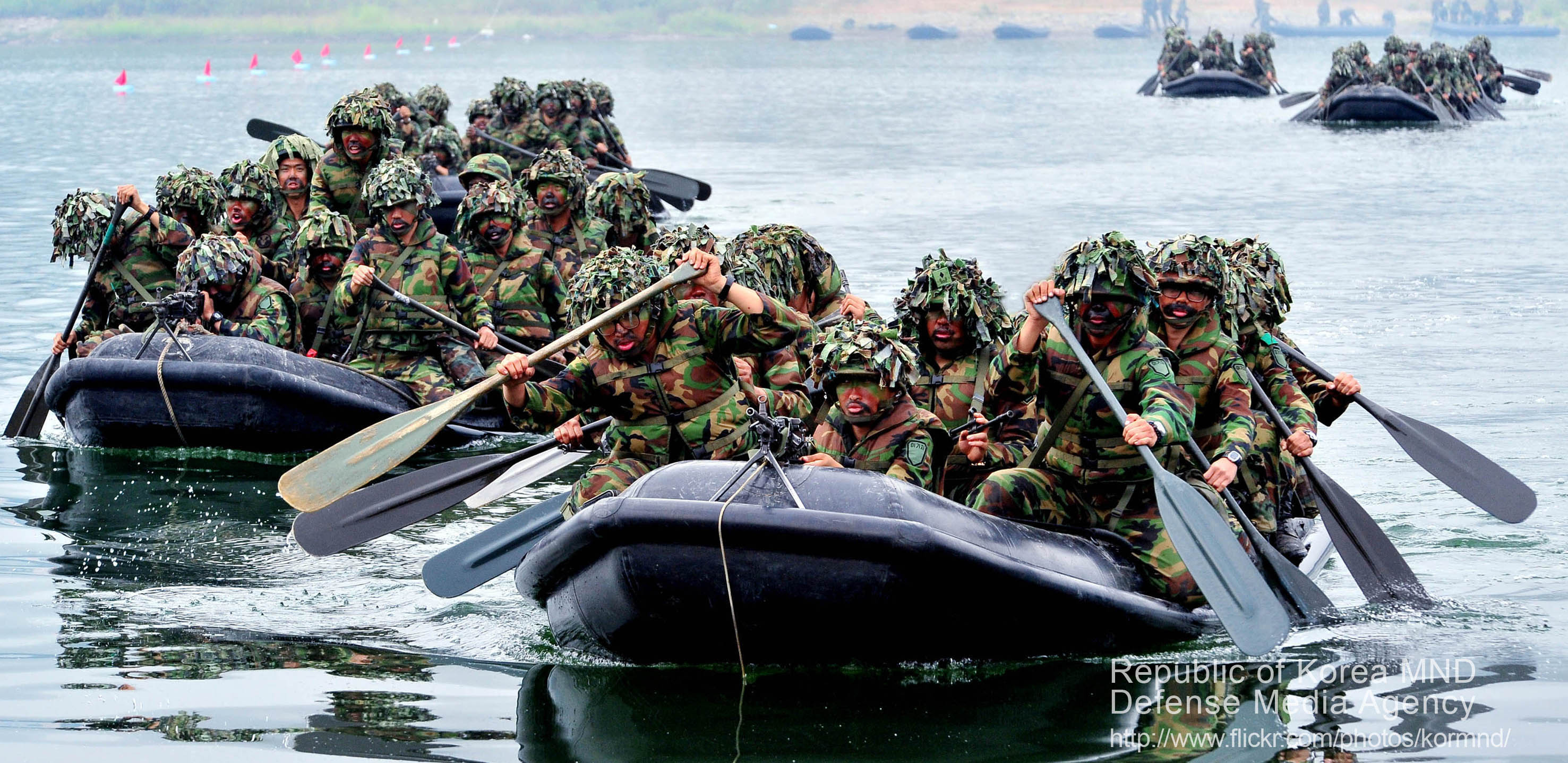 2011 국방화보 Rep. of Korea, Defense Photo Magazine 육군27사단 장병들이 9월 8일 강원도 화천군 화천대교 인근에서 강습도하훈련을 하고 있다.